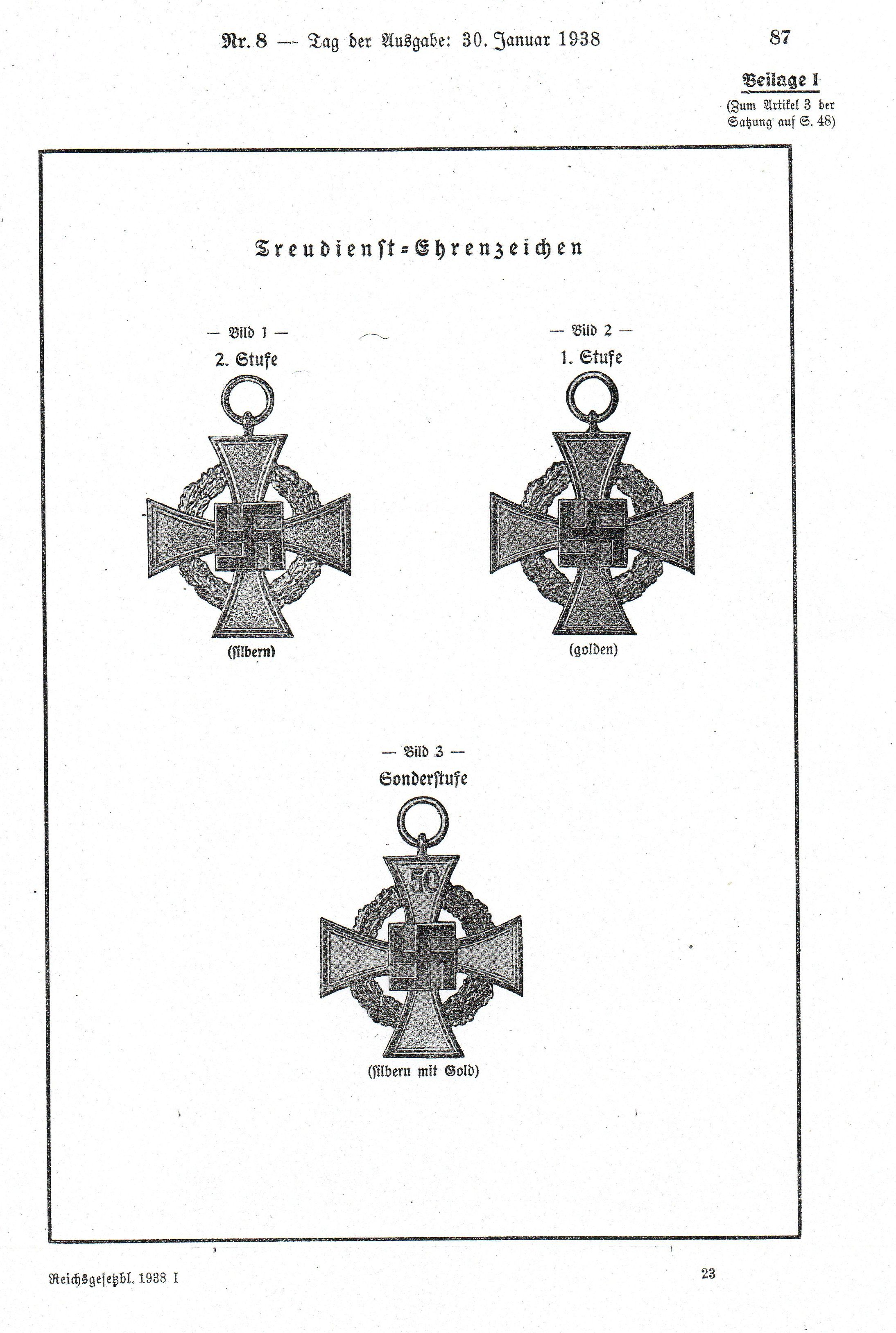 Anlage und Abbildung aus dem Reichsgesetzblatt zur Verordnung des Treudienst-Ehrenzeichens